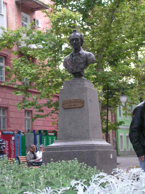 CALLE SUVOROVA EN KHERSON